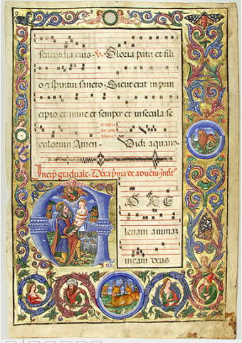 Gradual, Biblioteca Città di Arezzo Ms. 524